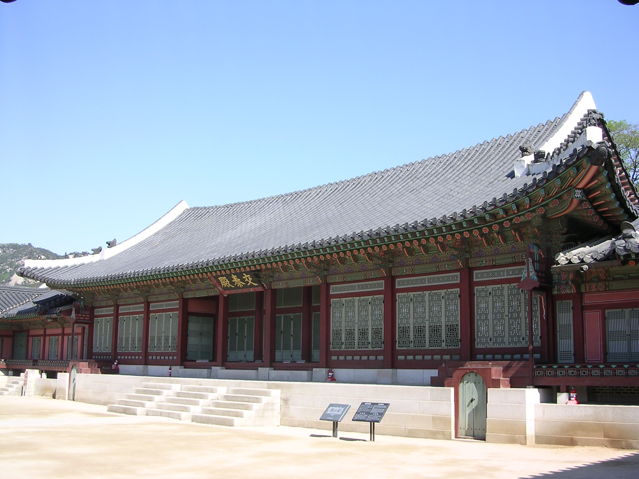 KyoTaeJeon in Gyeongbokgung, Seoul.